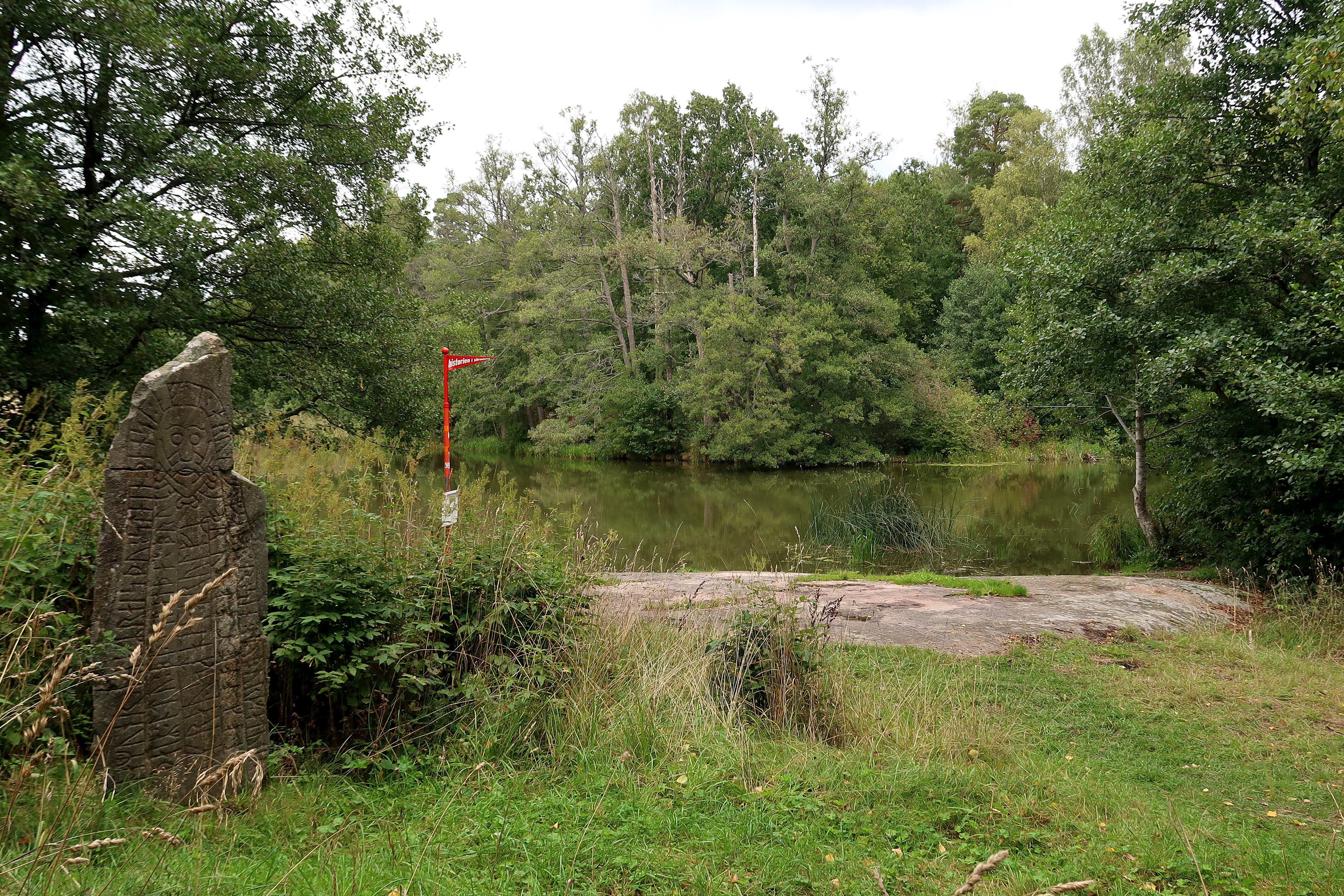 Släbro som fått sitt namn av den 50 meter långa kavelbron över Nyköpingsån.